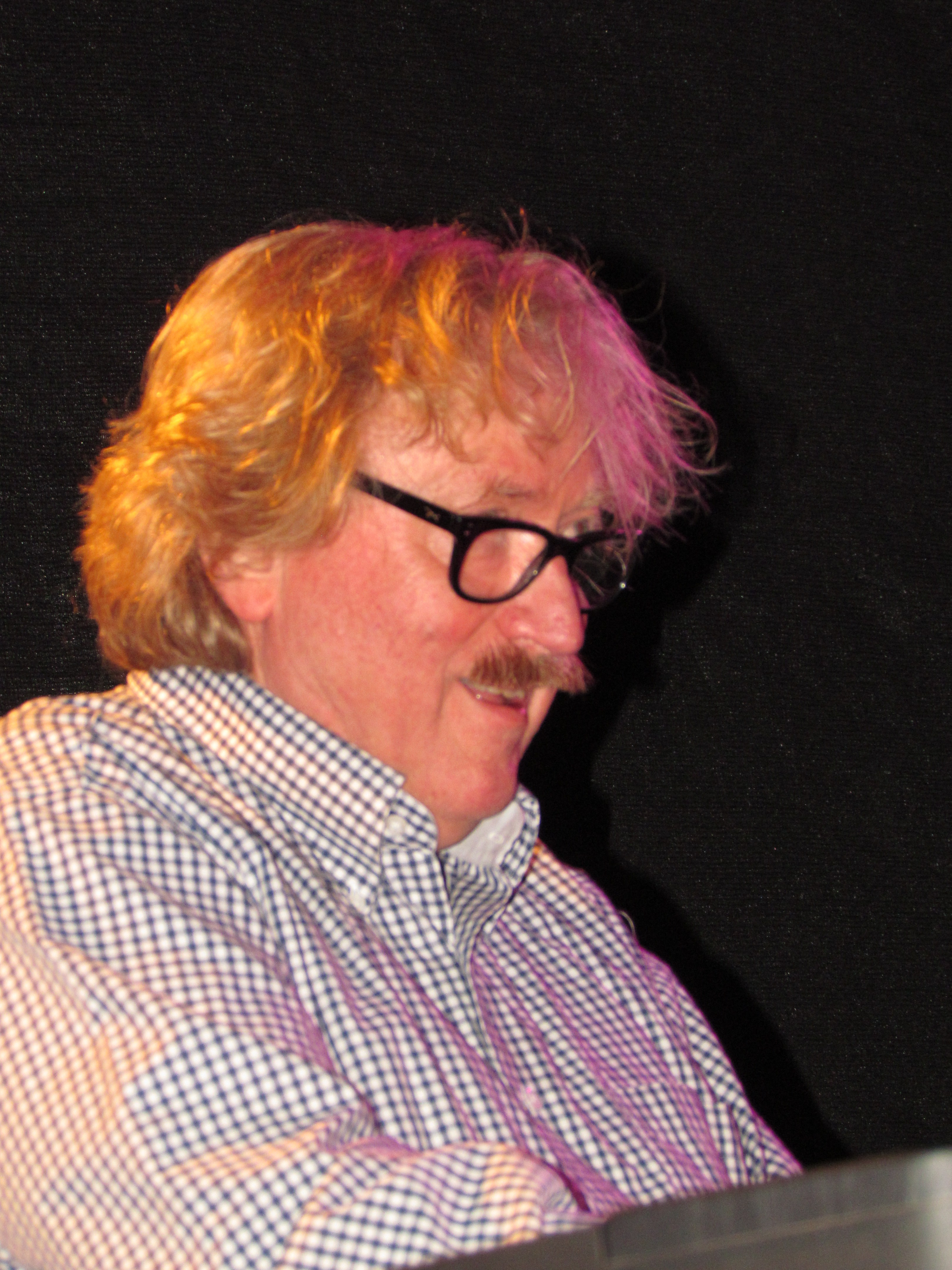 Bildinhalt: Jasper van’t Hof bei den Idar-Obersteiner Jazztagen. Aufnahmeort: Idar-Oberstein, Deutschland